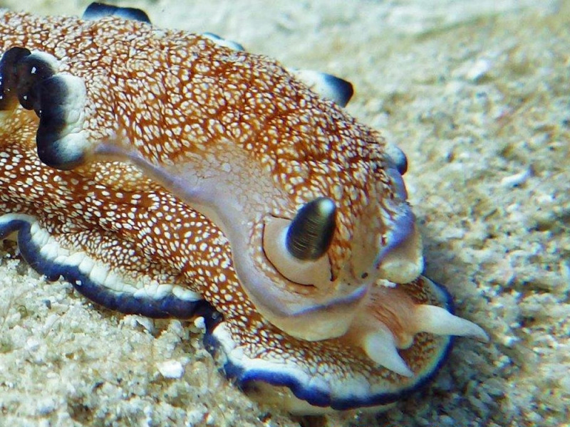 Ardeadoris pullata, detalle de rinóforo, el otro ha desaparecido, y lesión en la cabeza. Isla Lizard, Australia